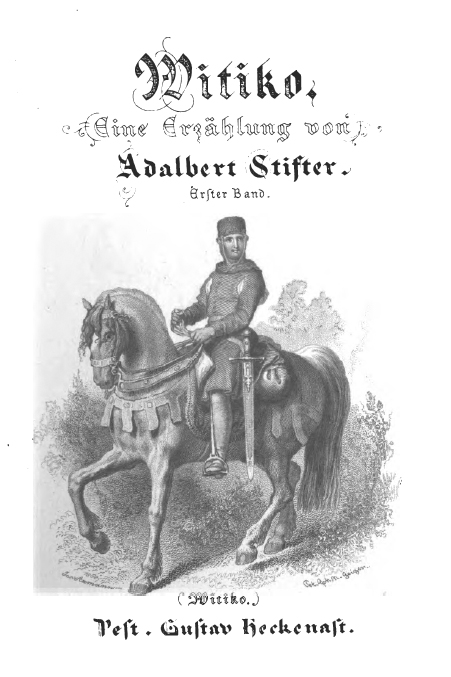 Frontispiz des ersten Bandes von Adalbert Stifters Witiko